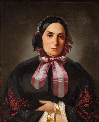 Medium: oil on canvas Size:63.5 x 52 cm. (25 x 20.5 in.)